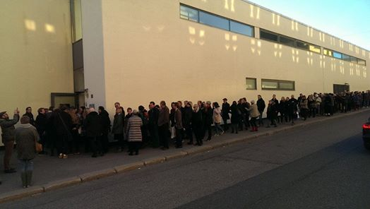 Uroens Bokhandel selger kun én bok: "Uroens bok" av den portugisiske forfatteren Fernando Pessoa.